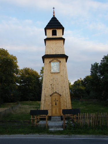 Dzwonnica w Koniówce po pożarze.